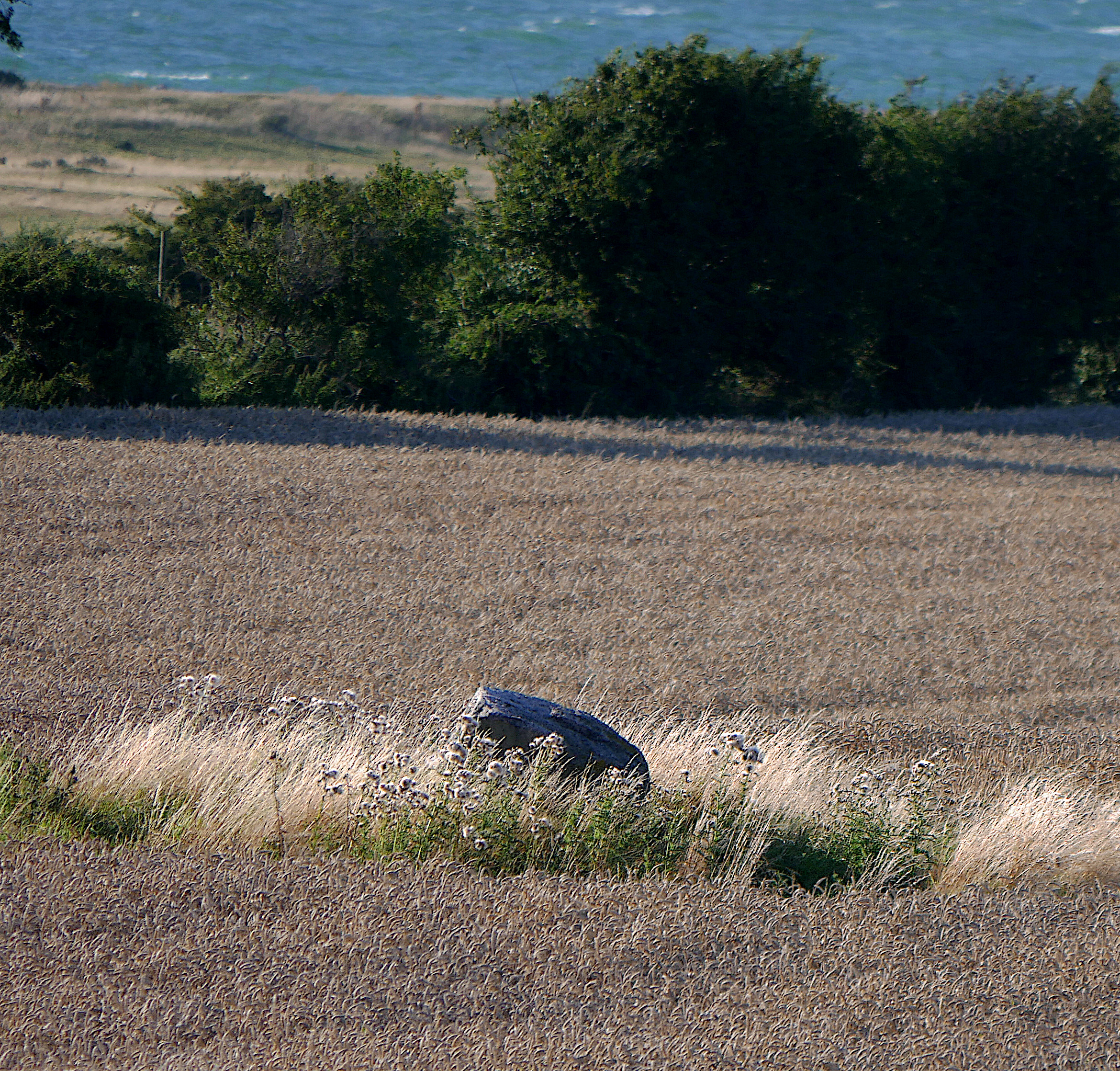 Megalithgrab 4 auf Helnaes. Der freistehende Nord-Süd orientierte Dolmen hat eine rechteckige Kammer von 1,1 m Länge und 0,4 bis 0,7 m Breite. Sie besteht aus vier Tragsteinen, je zwei im Westen und Osten, einem Endstein in einer Feldgrenze im Norden und einem Deckstein in situ. Foto von der Straße aus, da er im Juli 2020 unzugänglich im Kornfeld lag.